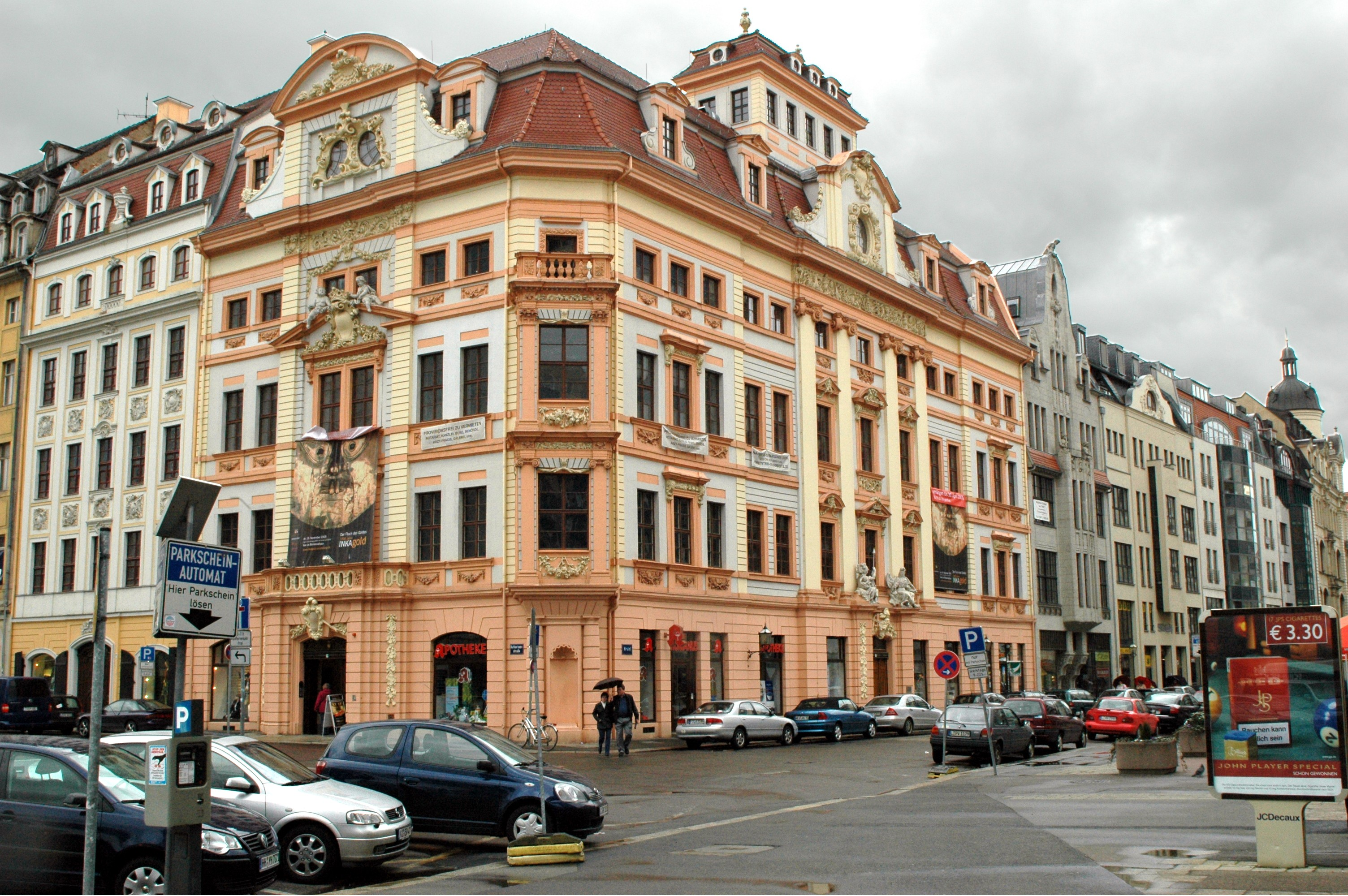 Romanushaus in Leipzig